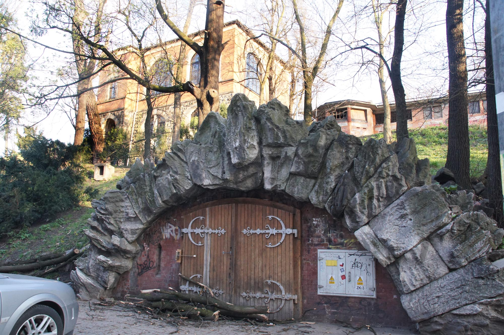 Wrocław, Bastion Sakwowy, tzw. Wzgórze Partyzantów, XIV, XVI, XIX